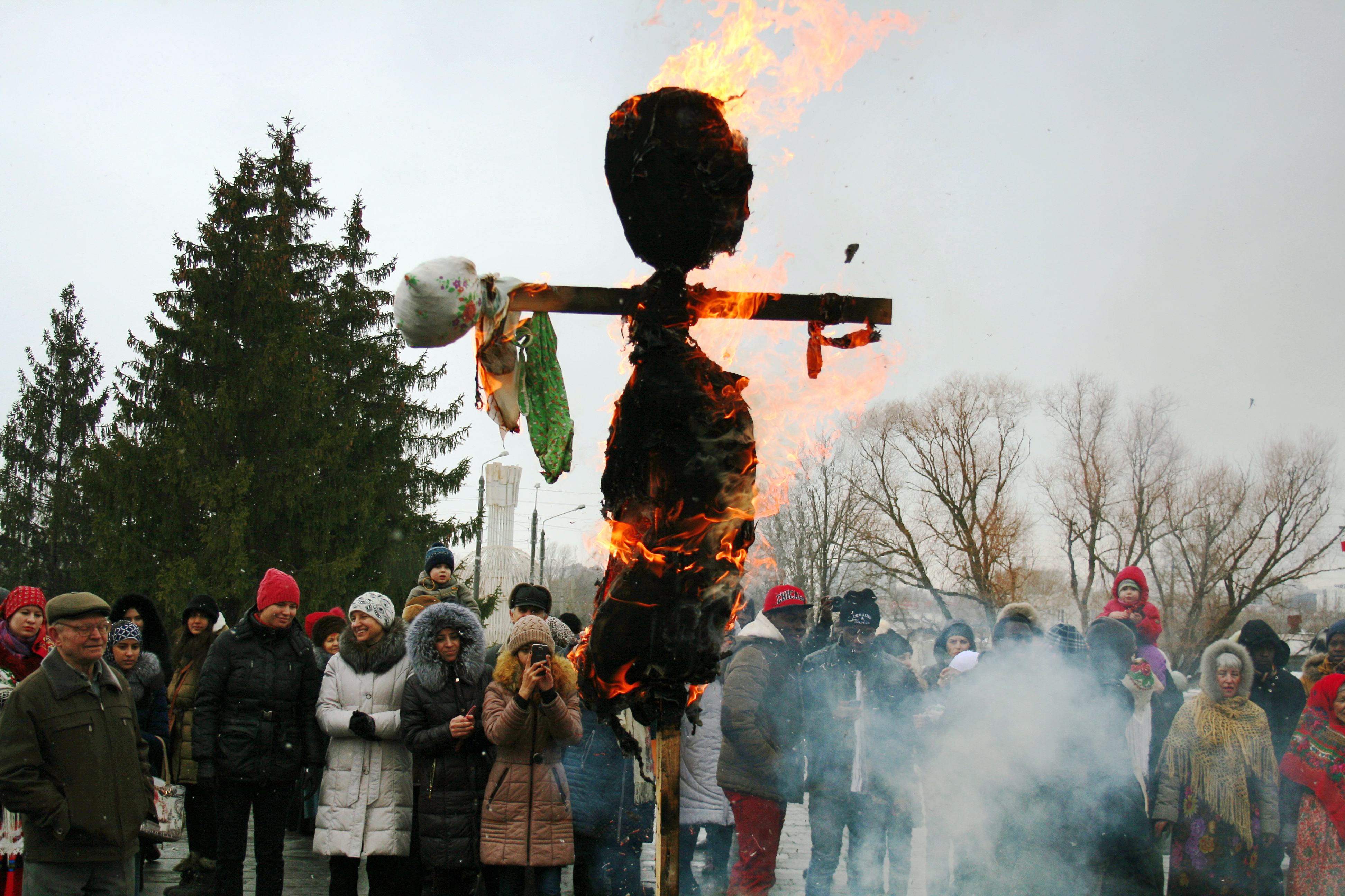 Масленица в Белгороде. Белгородский государственный центр народного творчества.